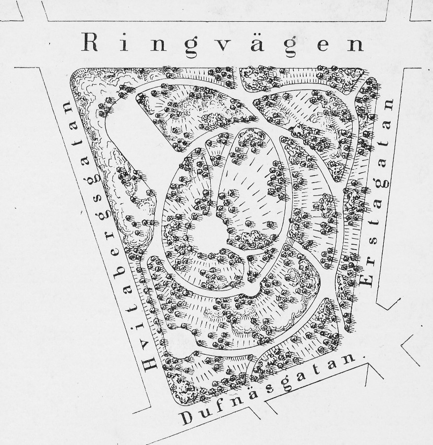 Anläggningsritning över Vitabergsparkens södra del